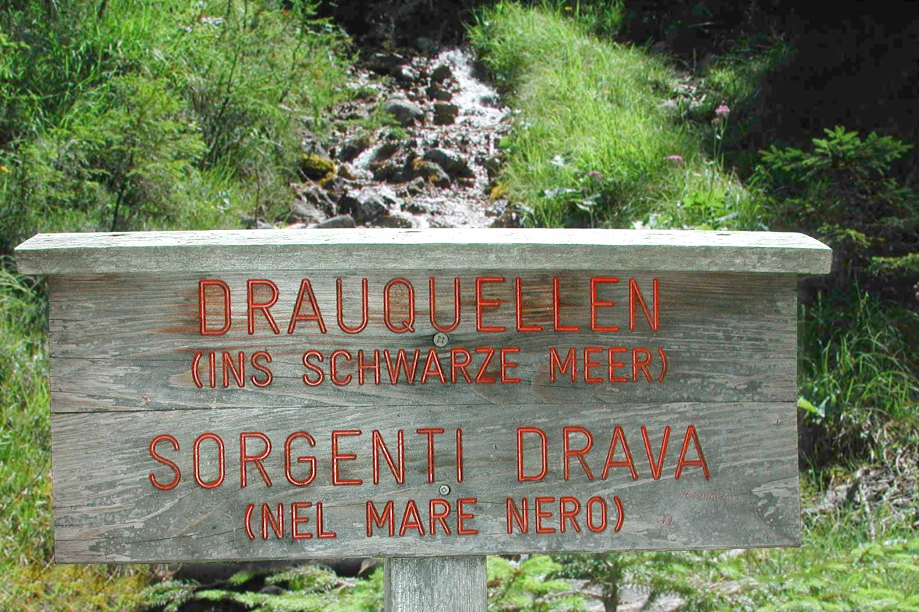 Drauquellen am Toblacher Feld in Südtirol - 20:17, 8. Mai 2006 Dreinagel 1800 x 1200 (278.478 Byte) (* Bildbeschreibung: Drauquellen am Toblacher Feld in Südtirol * Quelle: selbst fotografiert * Fotograf/Zeichner: dreinagel * Datum: 27.7.2004 * Sonstiges: ... )